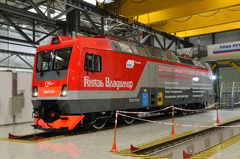 Электровоз 2ЭВ120